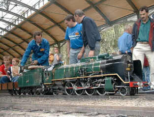 Dani Bellemans - eigen opname - verspreiding toegestaan